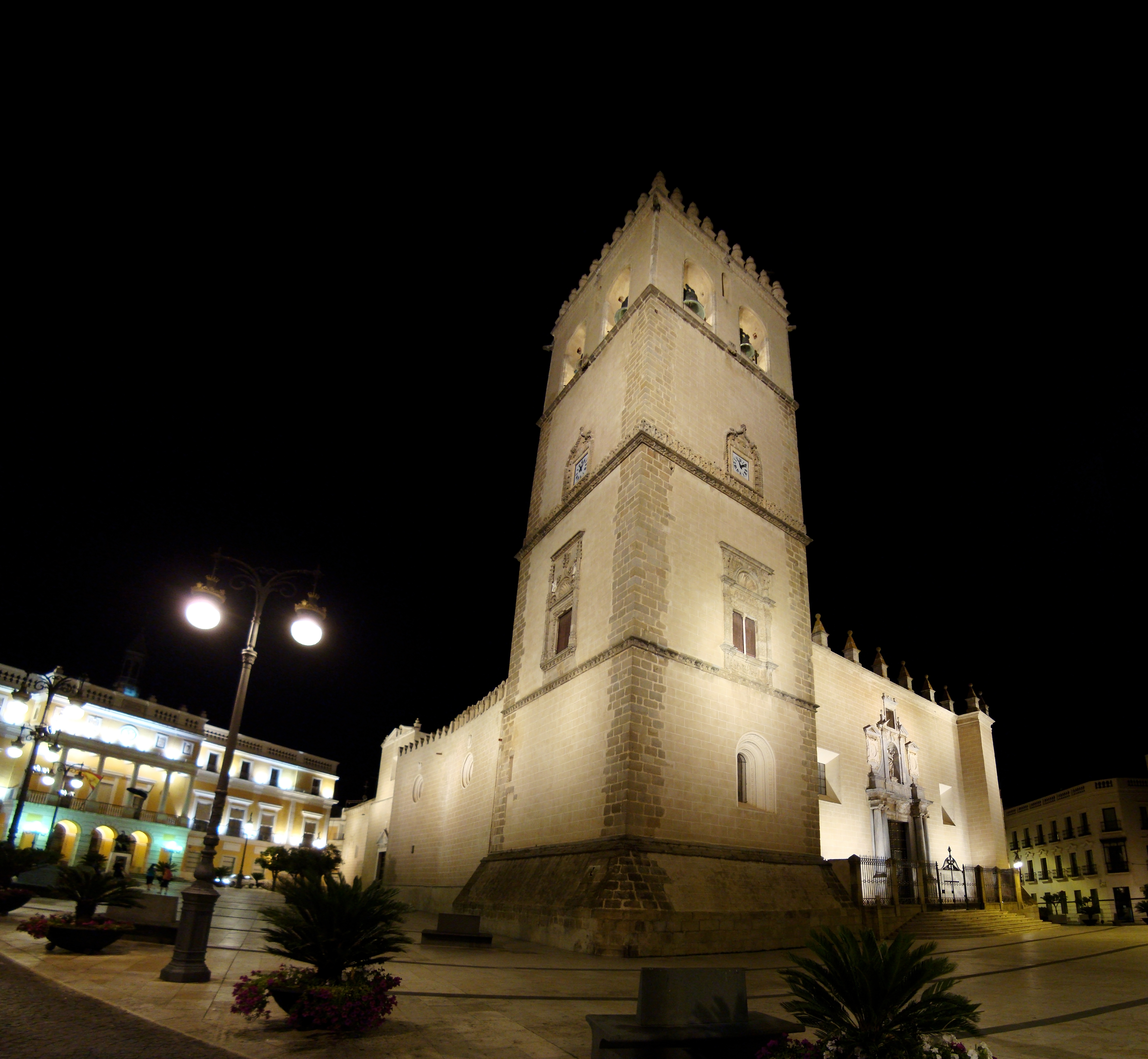 S.I. Catedral de Badajoz Badajoz Cathedral Badajoz Cathedral Native nameCatedral de San Juan Bautista de BadajozLocationBadajoz, (Spain)Coordinates38° 52′ 42.4″ N, 6° 58′ 09.89″ W Established13th-centuryWeb page control : Q2942592 VIAF: 167591386 LCCN: nr89009181 BIC: RI-51-0000394 BNE: XX94281 WorldCat institution QS:P195,Q2942592